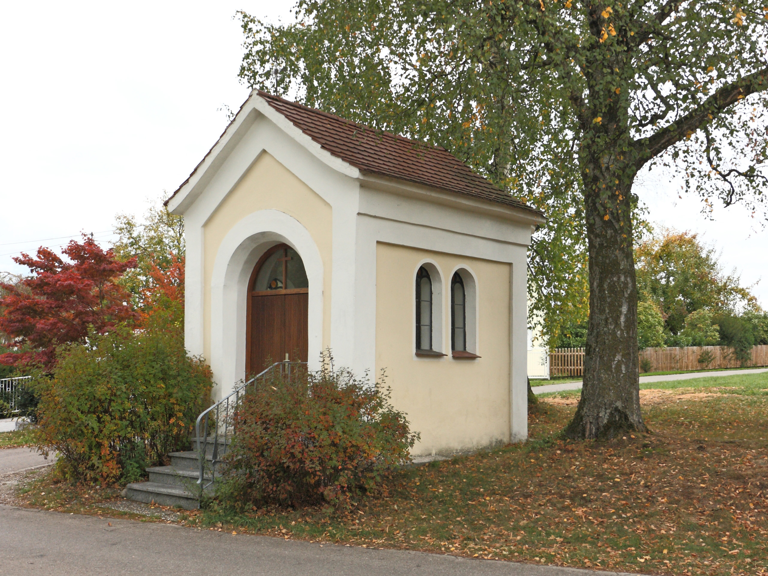 Südostansicht